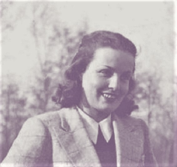 Lidia Beccaria Rolfi (1925 - 1996)